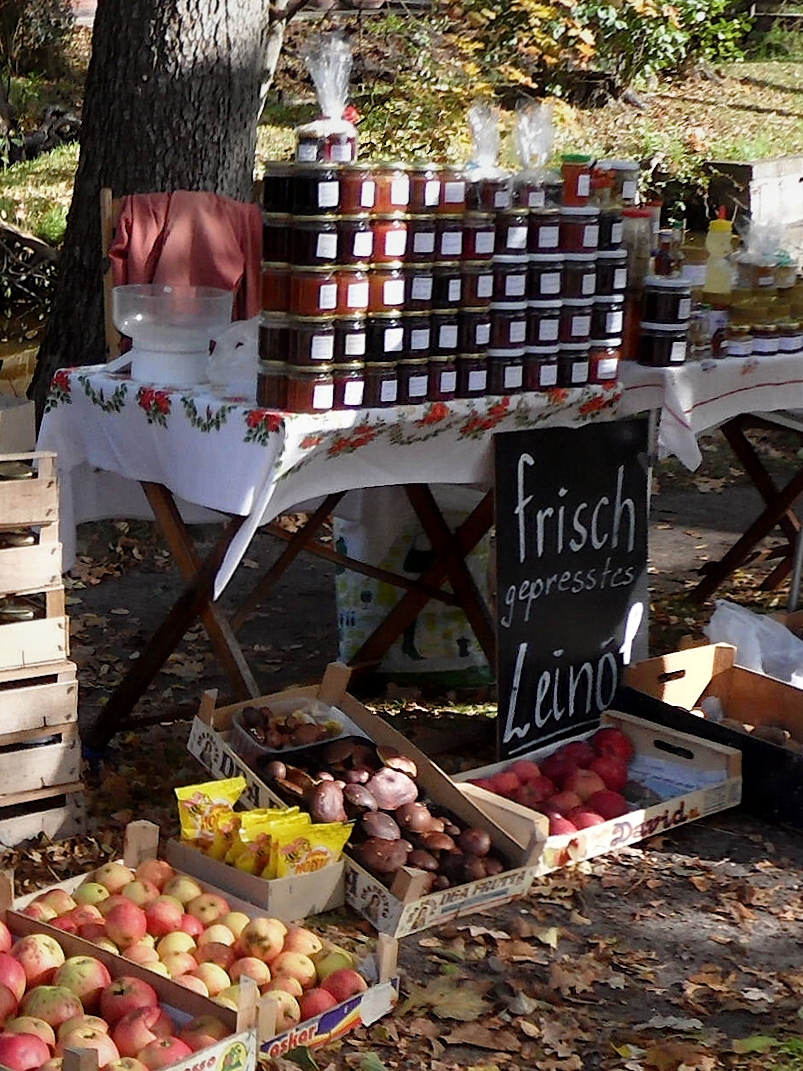 Hofverkauf: Verkaufsstand ("Marktstand") auf dem Gelände einer Fischerei in Storkow-Groß Schauen, Landkreis Oder-Spree, Brandenburg (Deutschland). Angeboten werden u. a. Obst (Äpfel) und andere landwirtschaftliche Produkte sowie Marmeladen und „frisch gepresstes Leinöl“.